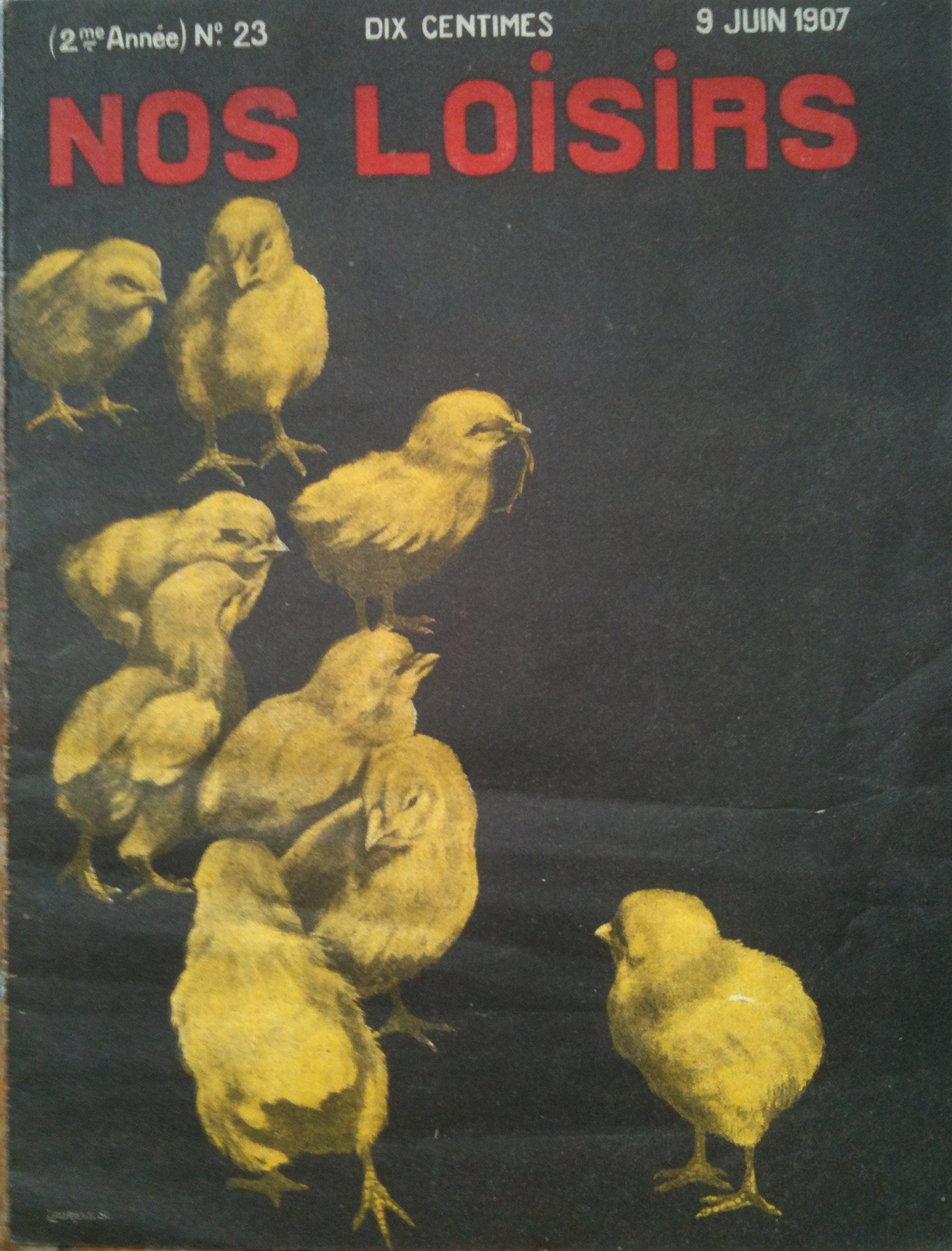 Couverture en photogravure de Nos loisirs, année 2, n° 26, du 9 juin 1907.